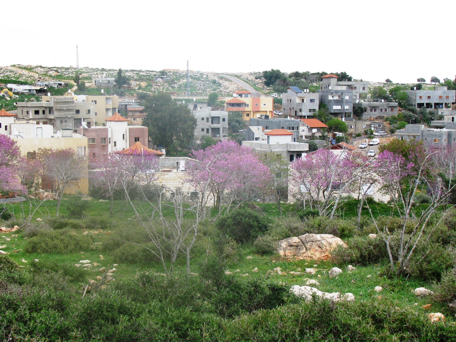 כמאנה וא כפר בדואי בגליל בתחומי המועצה האזורית משגב. צילום של השכונה המערבית